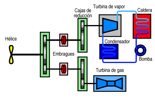 Esquema de un sistema de propulsión COSAG Same as Image:COSAG-diagram.png with Spanish legend. Modified version of a public domain drawing made by Alureiter. Modifications also released into public domain. Idéntica a Image:COSAG-diagram.png con leyendas en español. Versión modificada de un dibujo hecho por Alureiter y puesto por él en el dominio público. Las modificaciones son también colocadas en el dominio público.